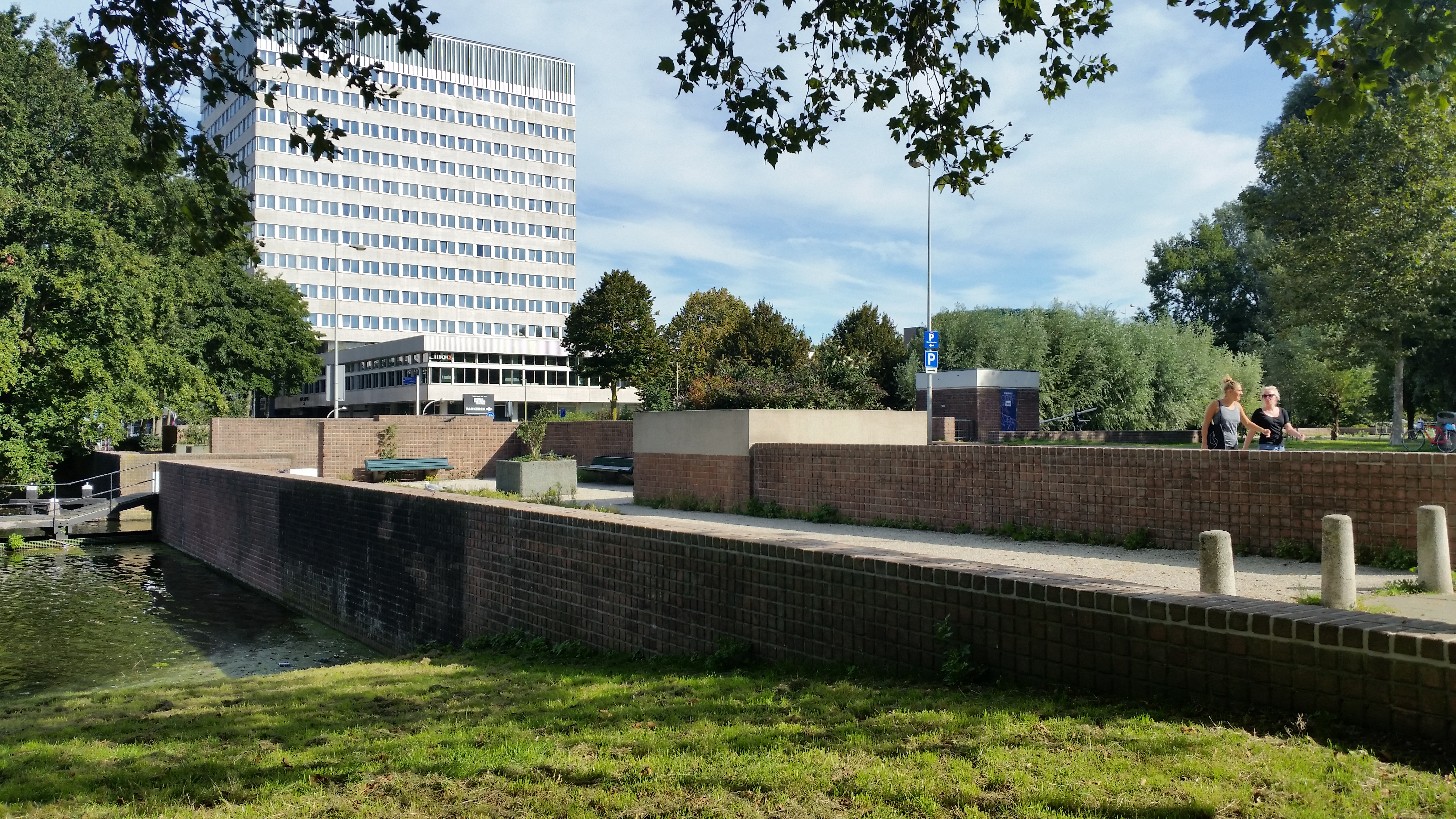 Brug 305, Karl Popperbrug; links World Fashion Centre